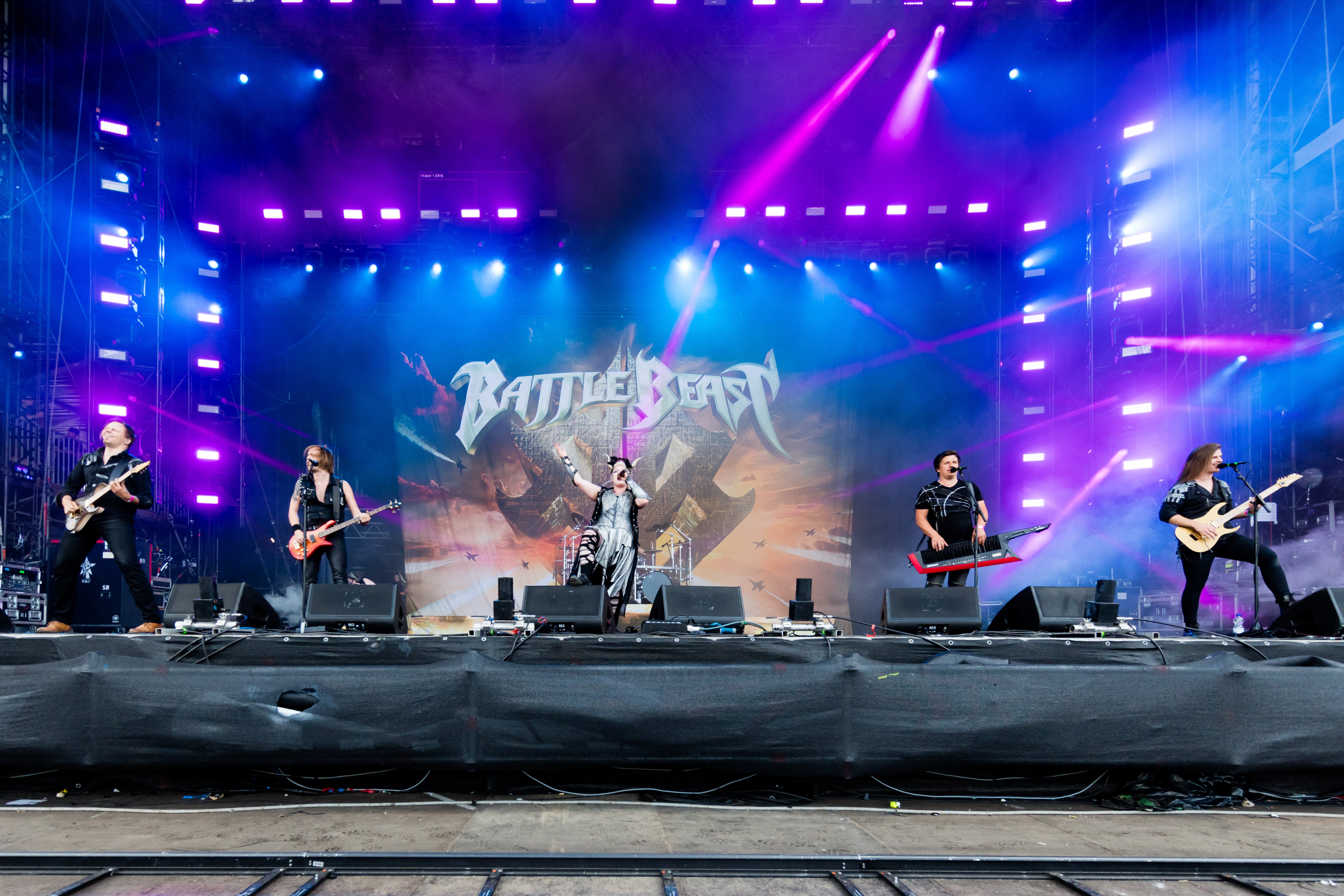 Battle Beast during Wacken Open Air at The Holy Wacken Land, Wacken, Schleswig-Holstein, Germany on 2019-08-03, Photo: Sven Mandel